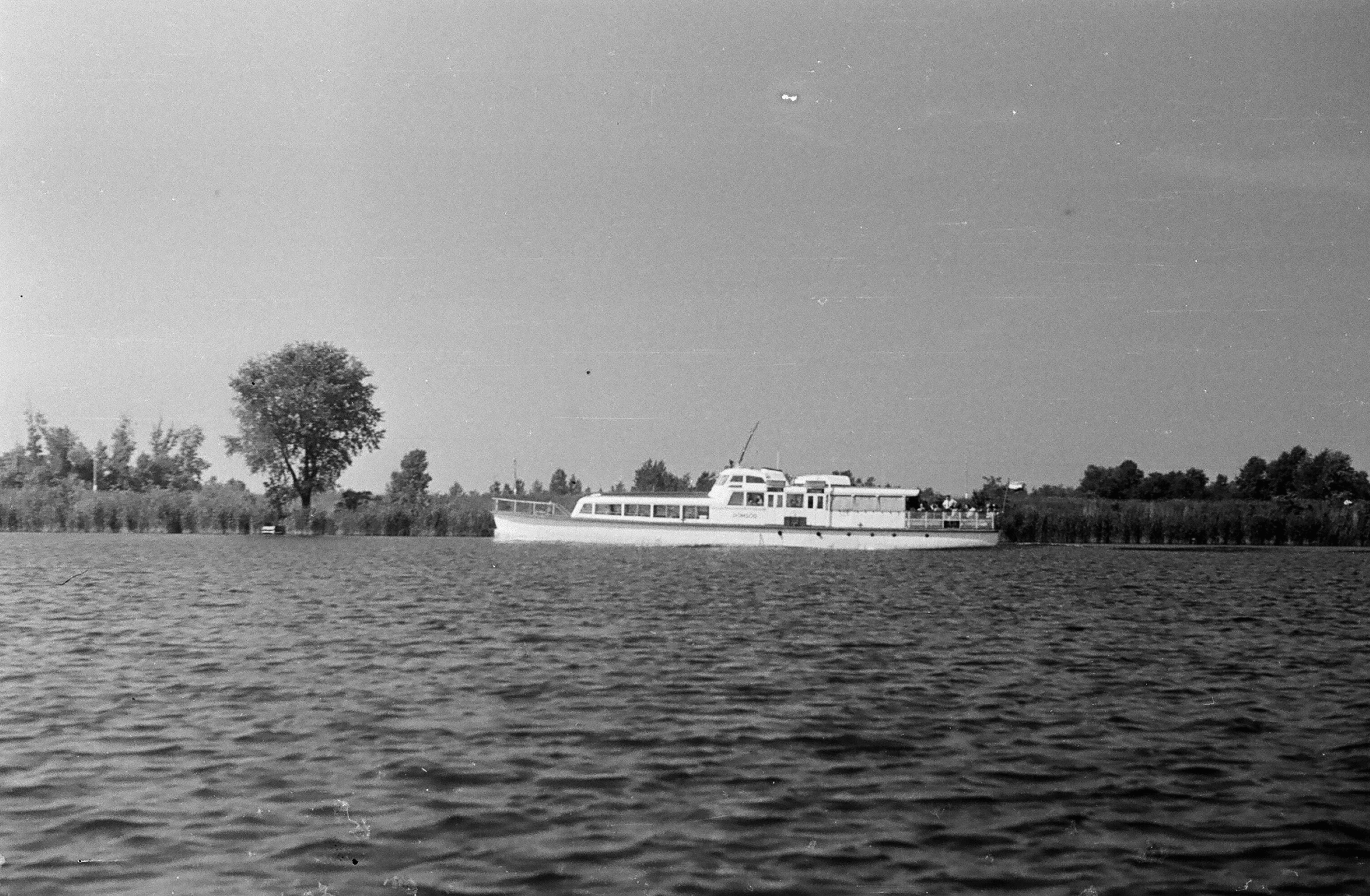 Ráckevei (Soroksári)-Duna, Dömsöd csavaros személyhajó. Location: Hungary Tags: ship Title: Ráckevei (Soroksári)-Duna, Dömsöd csavaros személyhajó.